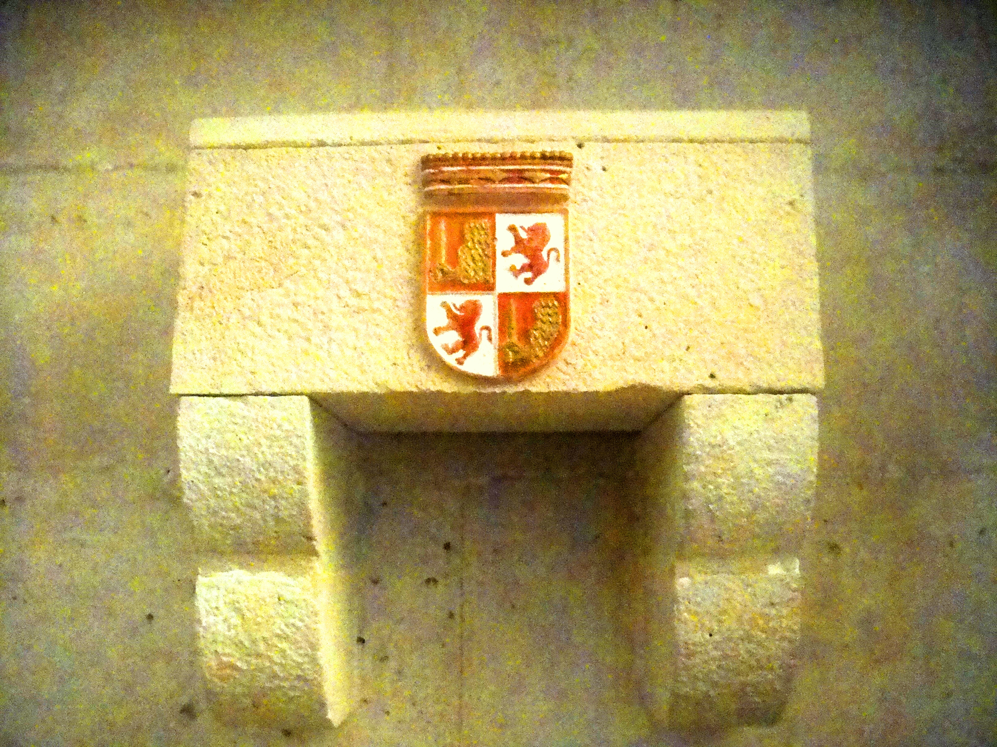 Arca de piedra que contiene en la actualidad los restos mortales del célebre escritor y magnate Don Juan Manuel (1282-1348), autor, entre otras obras, de El conde Lucanor. Don Juan Manuel, que era hijo del infante Manuel de Castilla y nieto del rey Fernando III el Santo, fundó en 1324, durante la minoría de edad de su pariente Alfonso XI de Castilla, de quien fue tutor junto con Juan el Tuerto y el infante Felipe de Castilla, el convento de San Pablo de Peñafiel, con la intención de que a su muerte su cadaver recibiera sepultura en la capilla mayor del templo. Y después de su muerte, ocurrida en la ciudad de Córdoba en 1348, cuando tenía unos 66 años de edad, su cadaver fue trasladado a este convento, donde también se custodiaban los manuscritos de sus obras literarias. El arca de piedra, adornada con el escudo de armas de Don Juan Manuel, está colocada en un arcosolio del lado de la Epístola de la capilla mayor del convento de San Pablo de Peñafiel, provincia de Valladolid, (España).